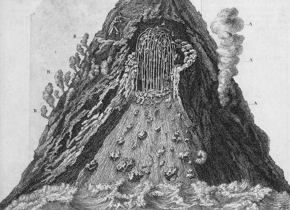 Stromboli (illustration de Voyages dans les deux Siciles de Lazzaro Spallanzani, volume I. Pl. dépl. 1 en reg. p. 280)